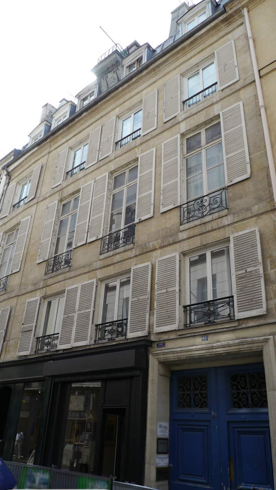 Immeuble habité par Mado Maurin et durant les années 1950 à 1968, par Patrick Dewaere, ses frères et sa soeur.